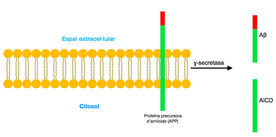 Tall proteolític de l'APP mitjançant la gamma secretasa